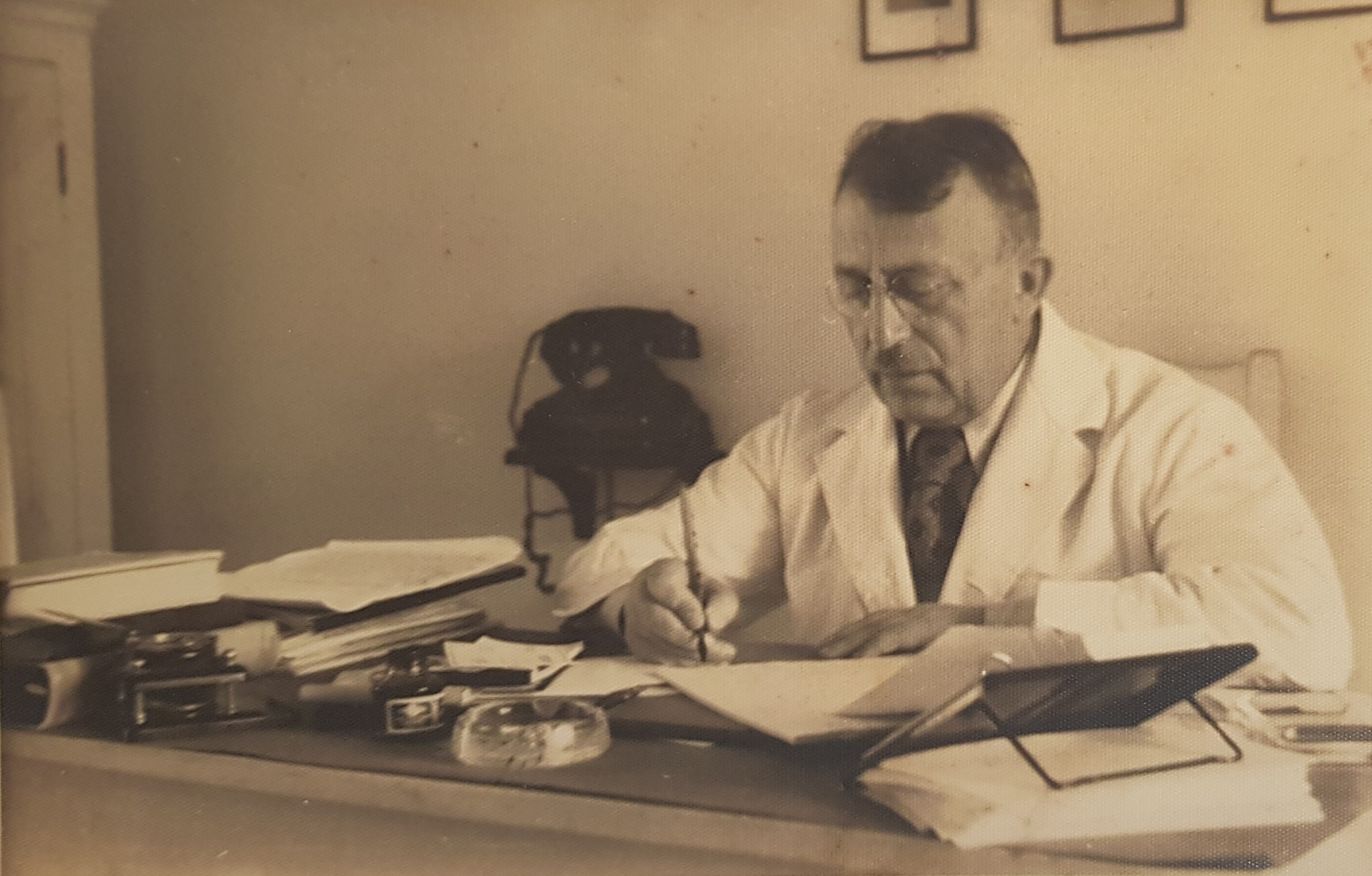 ד"ר נחום שימקין במרפאתו